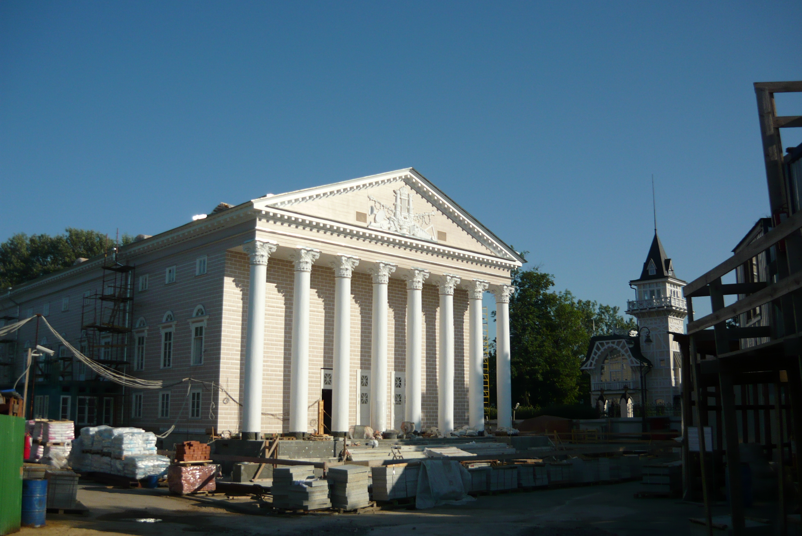 Каменноостровский театр, Санкт-Петербург